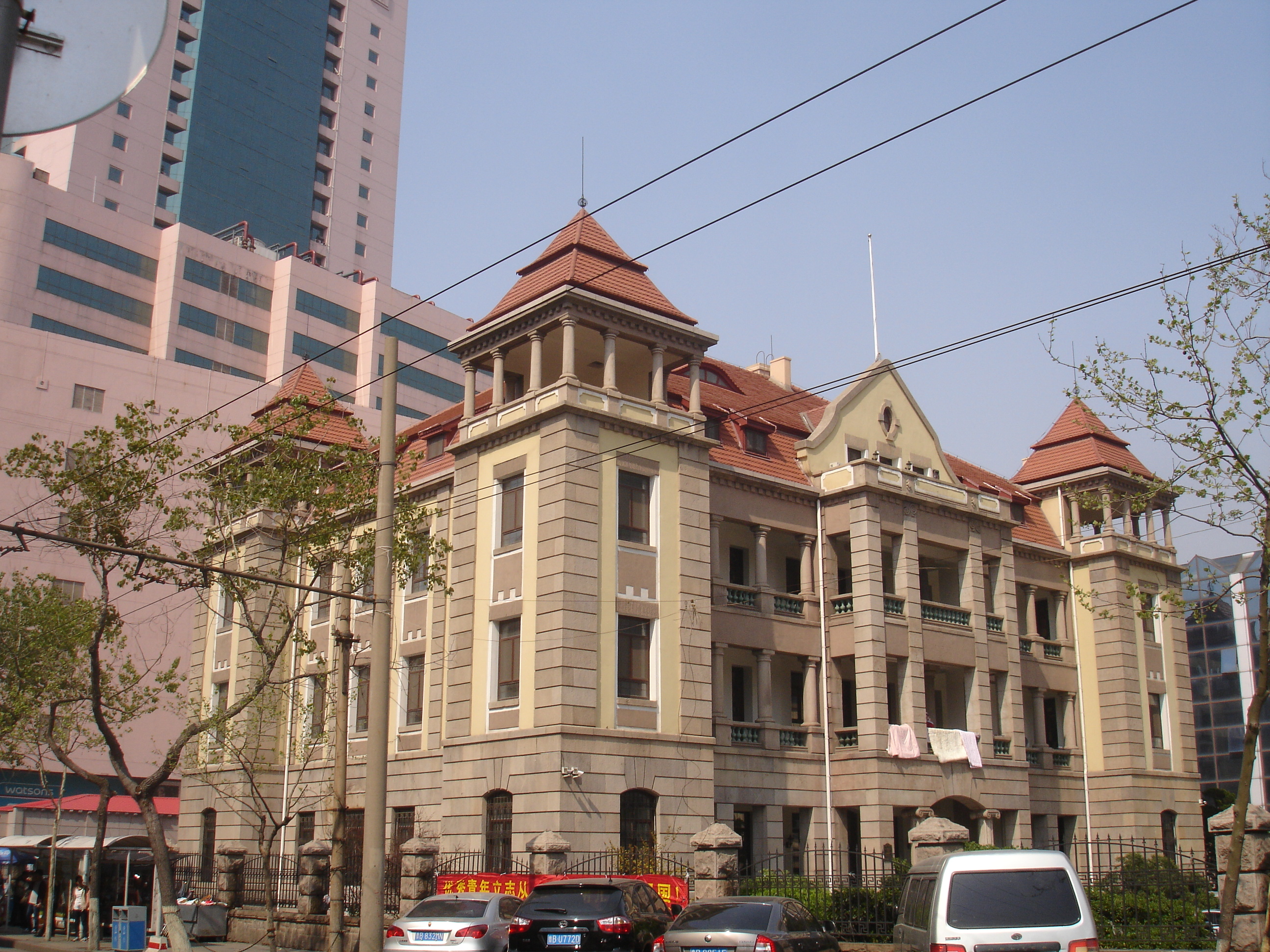 青岛东莱银行